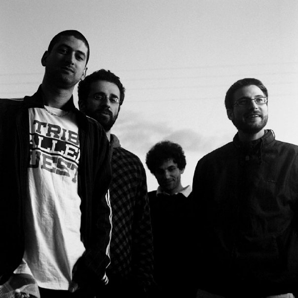 Le groupe français de musique électronique Depth Affect